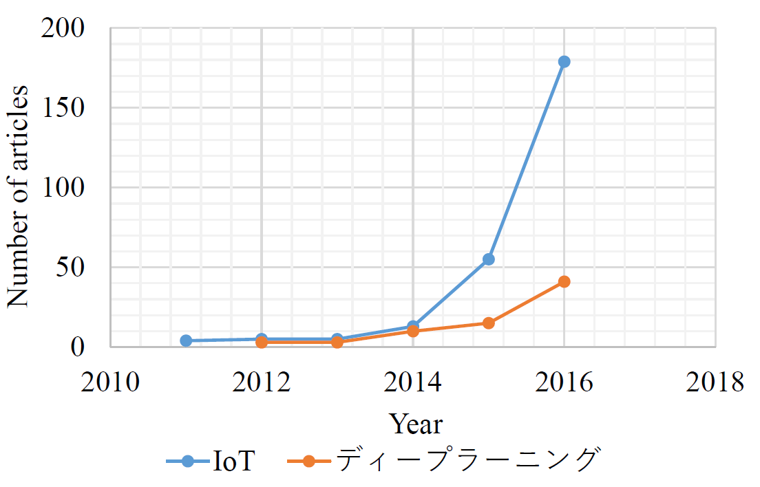 「IoT」と「ディープラーニング」の文献数推移